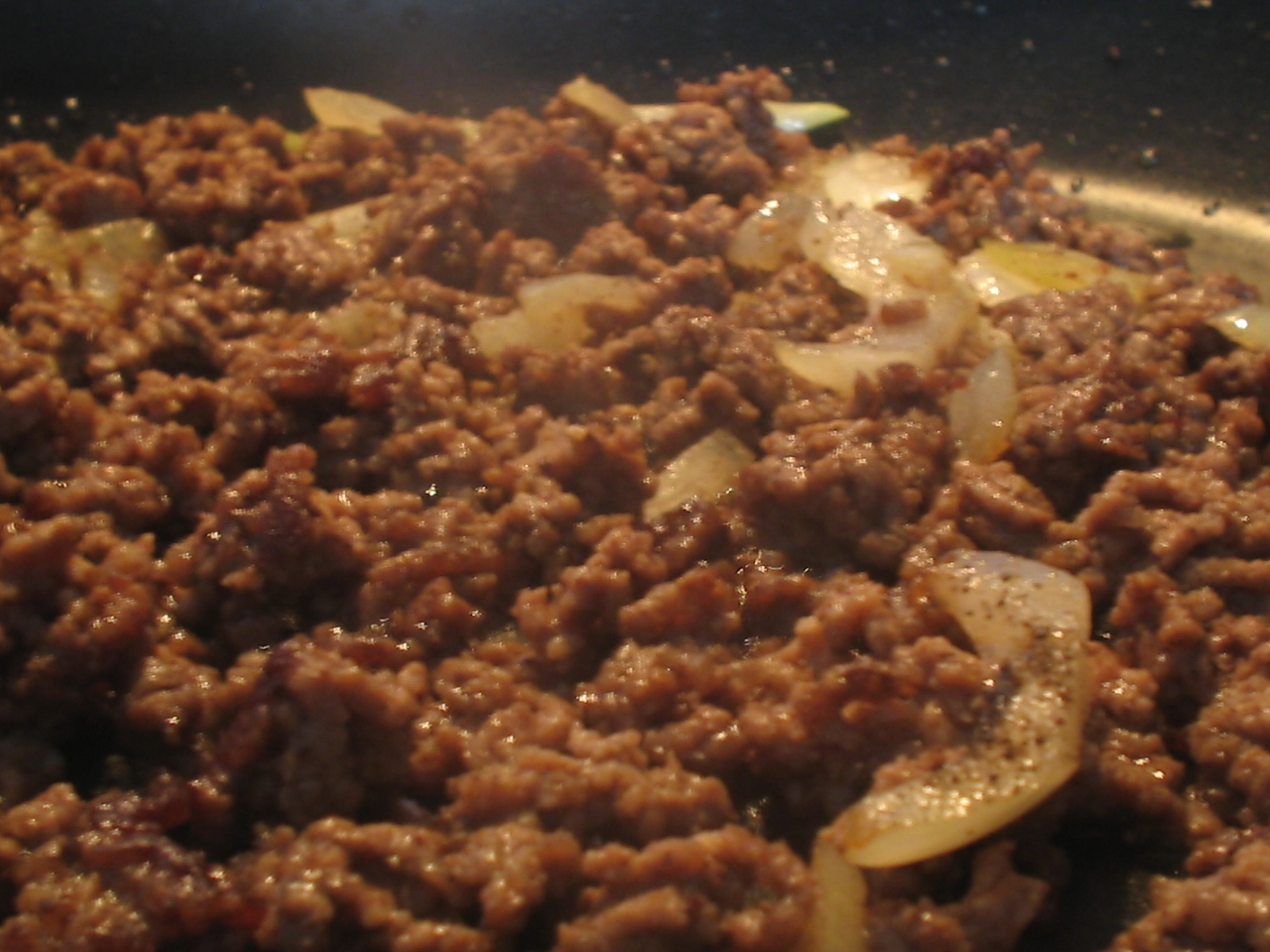 Gehakt in de pan met uitjes.